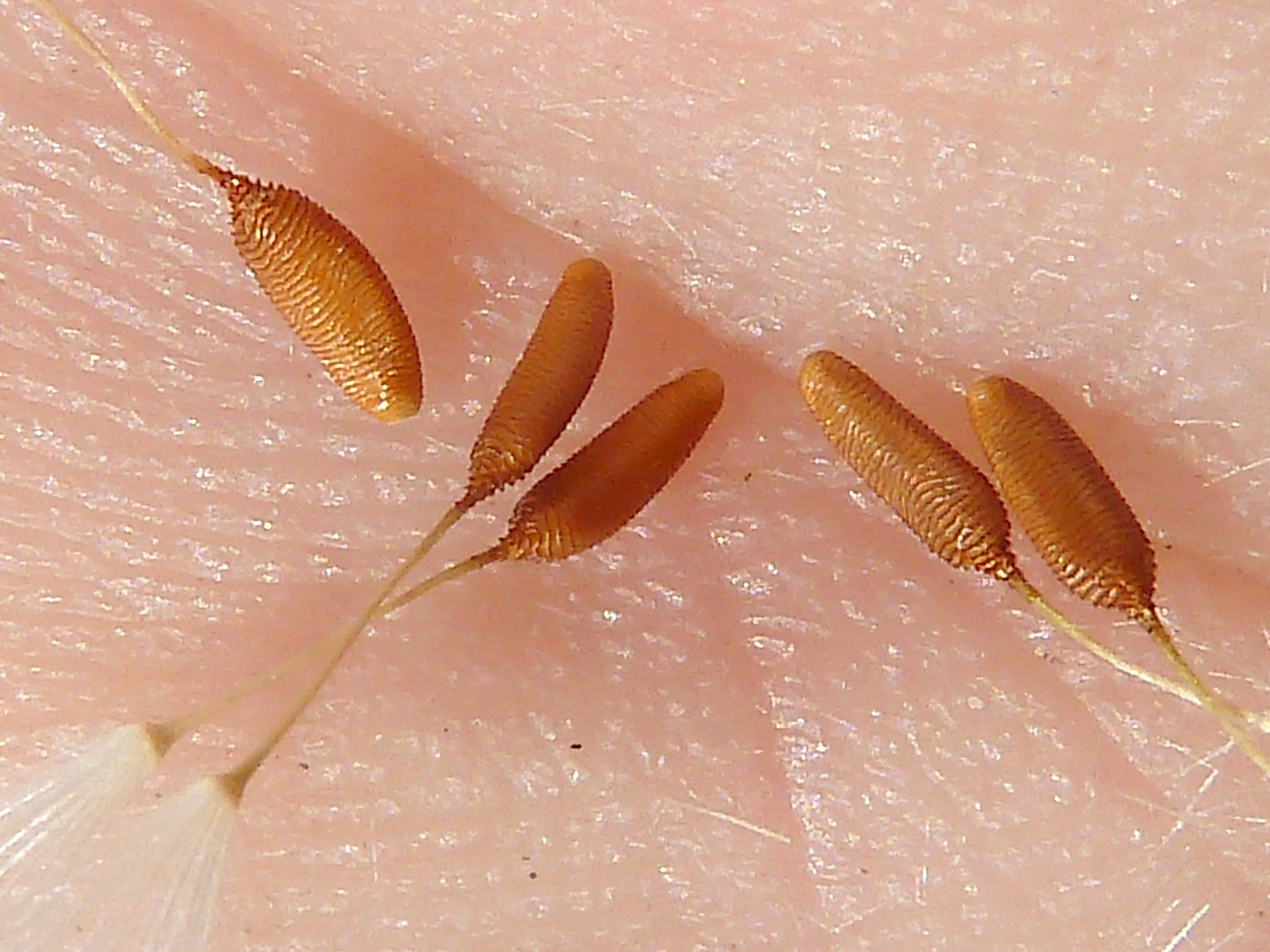 Helminthotheca echioides (raspasayo) - Detalle de la ornamentación vermicular de la superficie de los cuerpos de las cipselas internas. - Final Calle de la Paz, circa de la antigua Tejeria, Albatera, Provincia de Alicante, España).